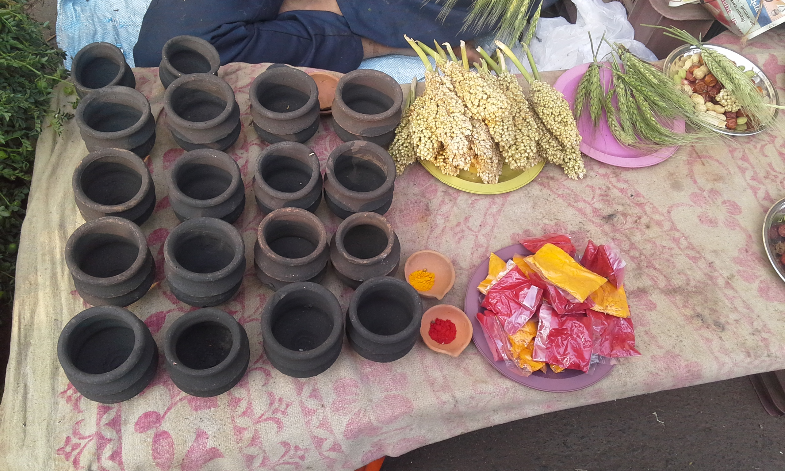 सुगड आणि वाणाचे साहित्य